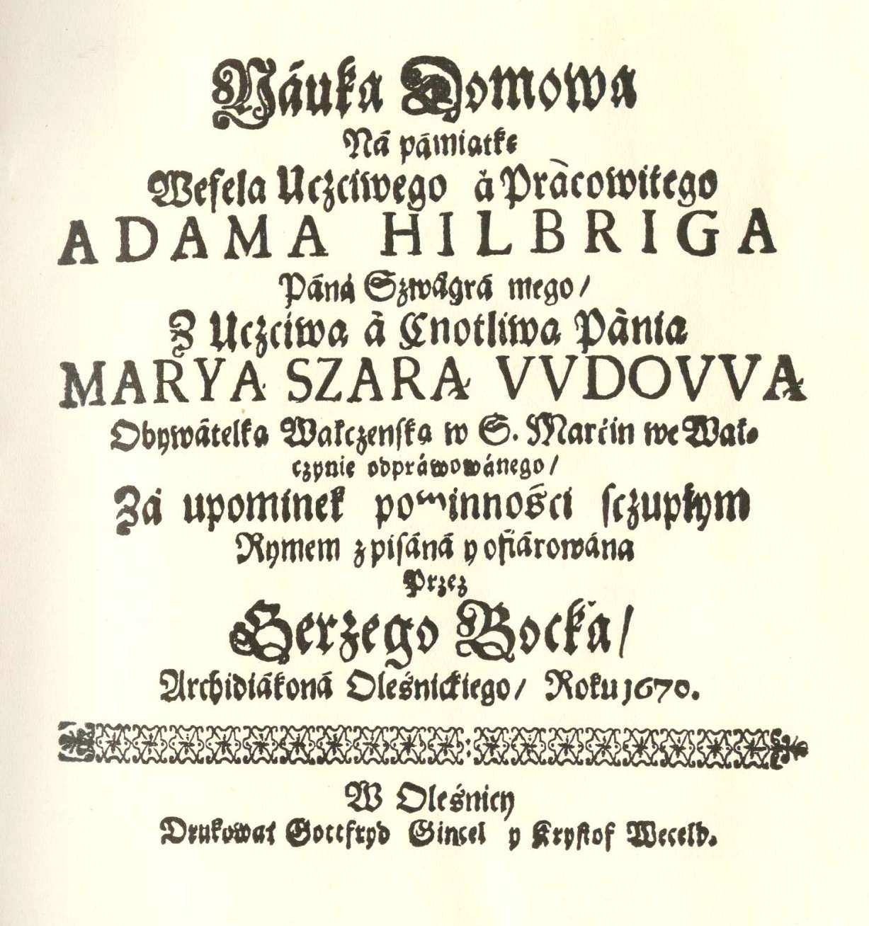 Jerzy Bock, "Nauka domowa", Oleśnica 1670.